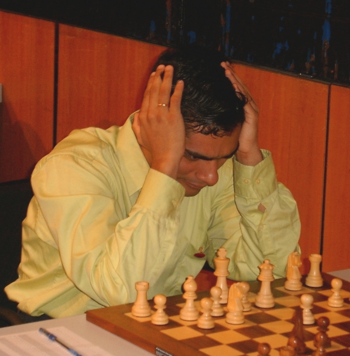 Krishnan Sasikiran, Indian chess grandmaster